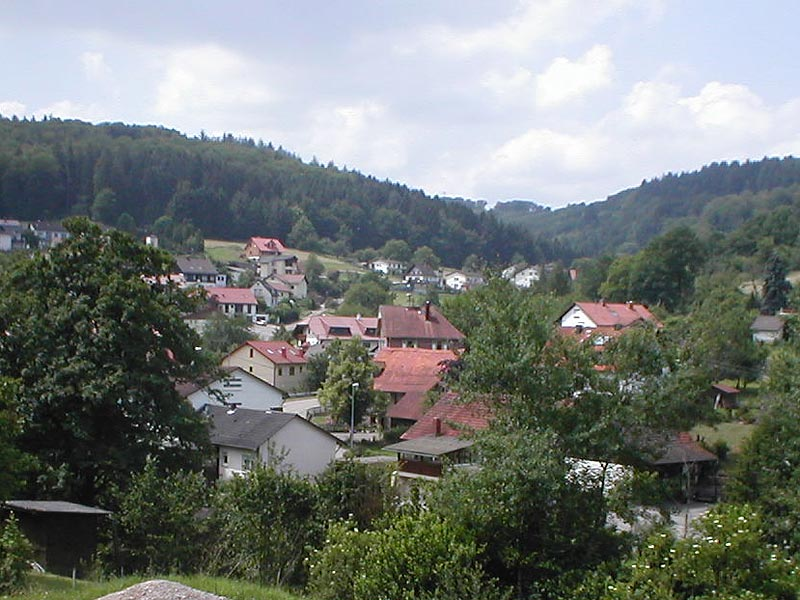 Blick über einen Teil von Schönbrunn-Allemühl. Das Dorf ist aus den Bachtälern in jüngerer Zeit auf die umliegenden Hänge gewachsen.